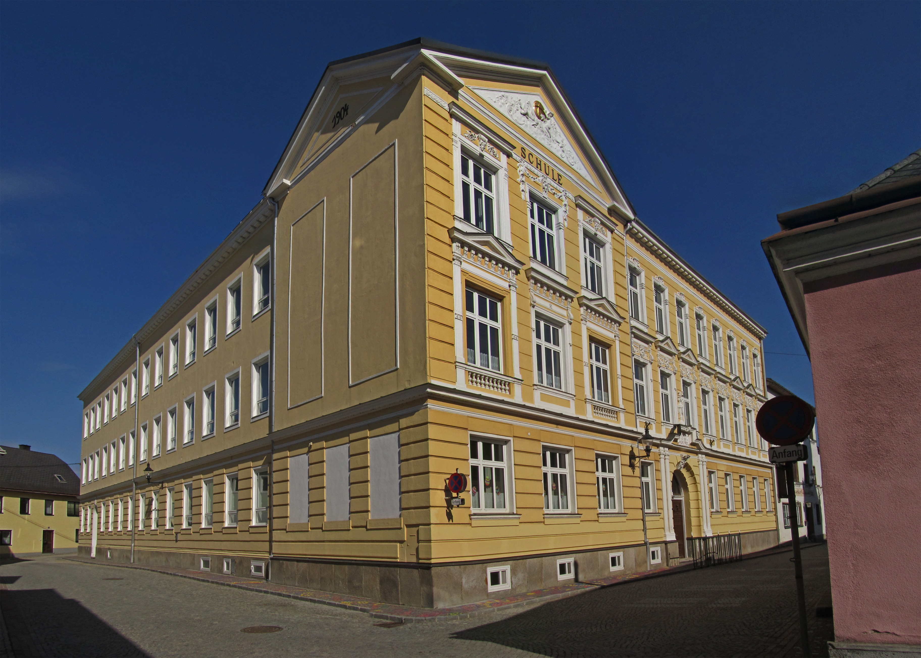 Schule, Heidenreichstein.